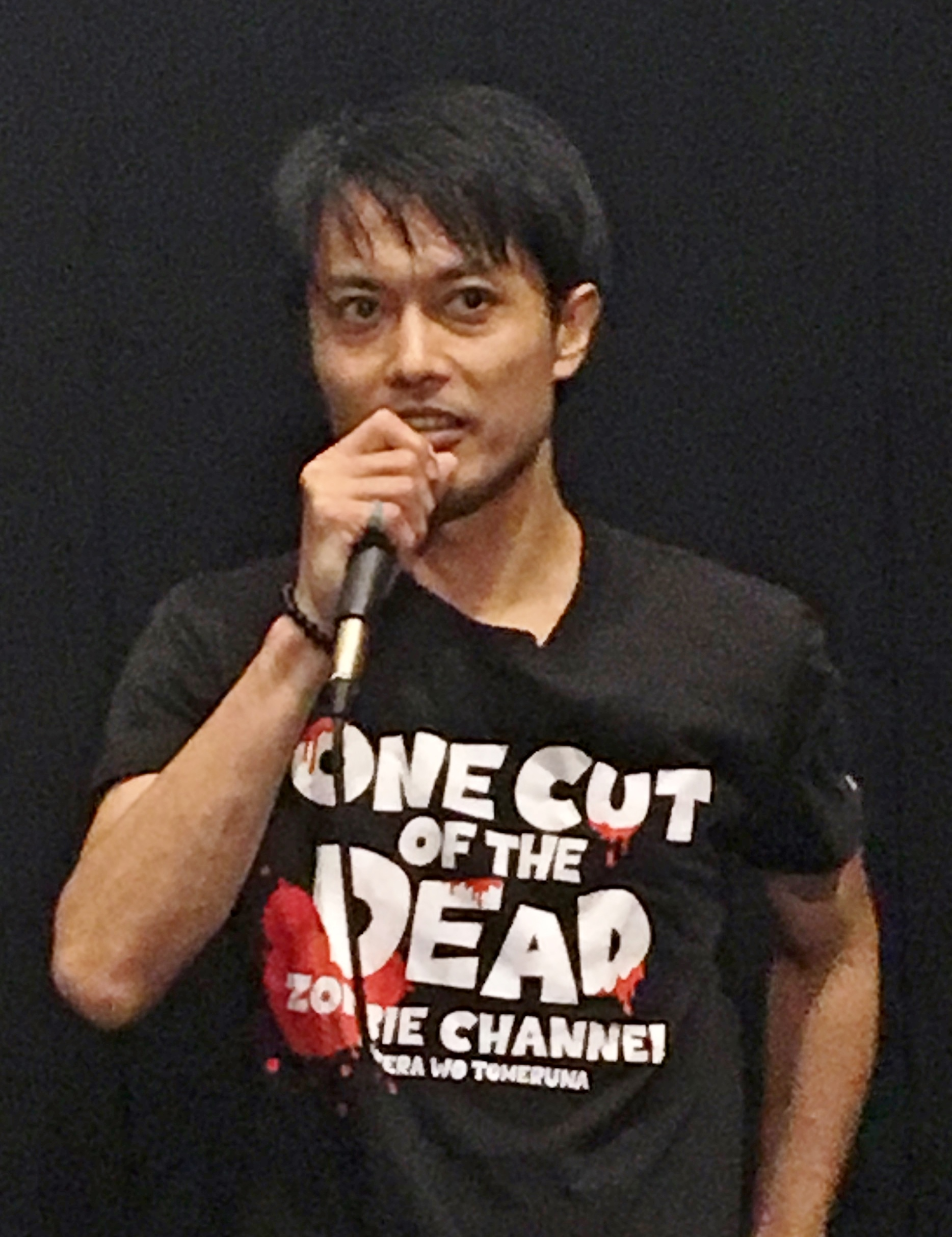 大沢真一郎（2018年7月14日、チネチッタ川崎）